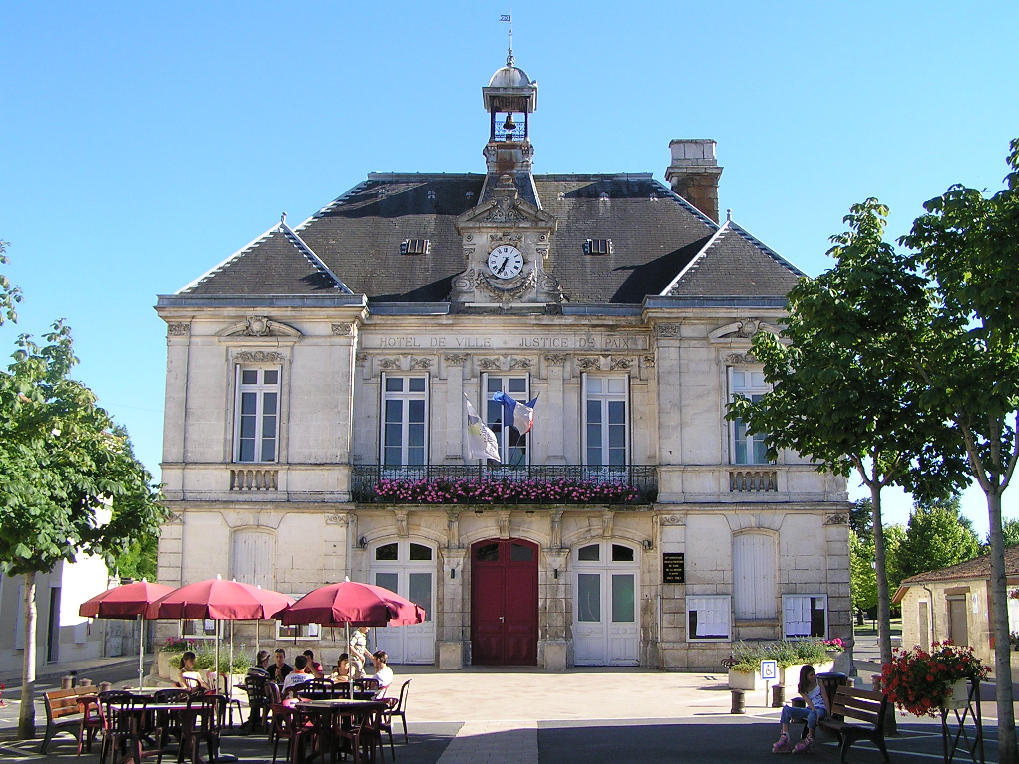 mairie d'Aigre